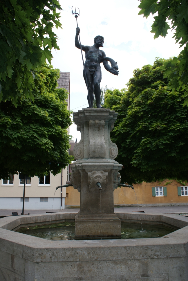 Ansicht des Neptunbrunnens bei der Fuggerei in Augsburg.